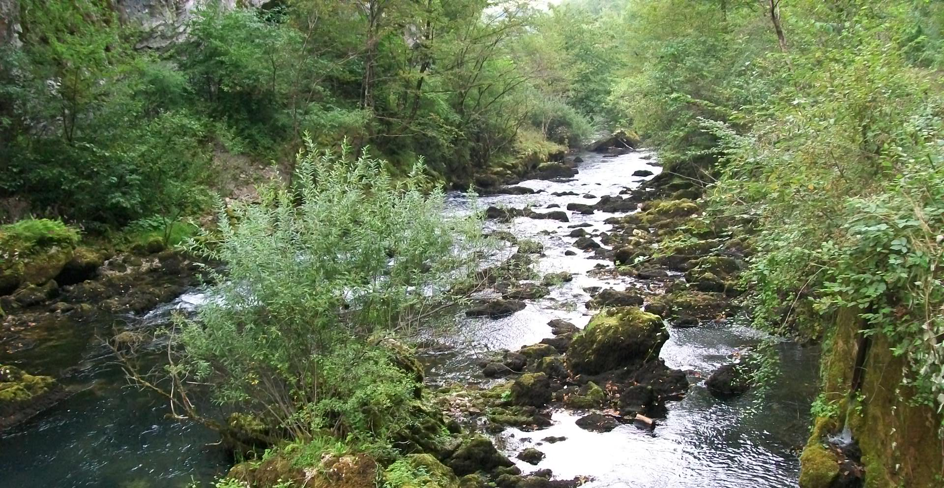 Sanica, Fluss, unterhalb der Quelle